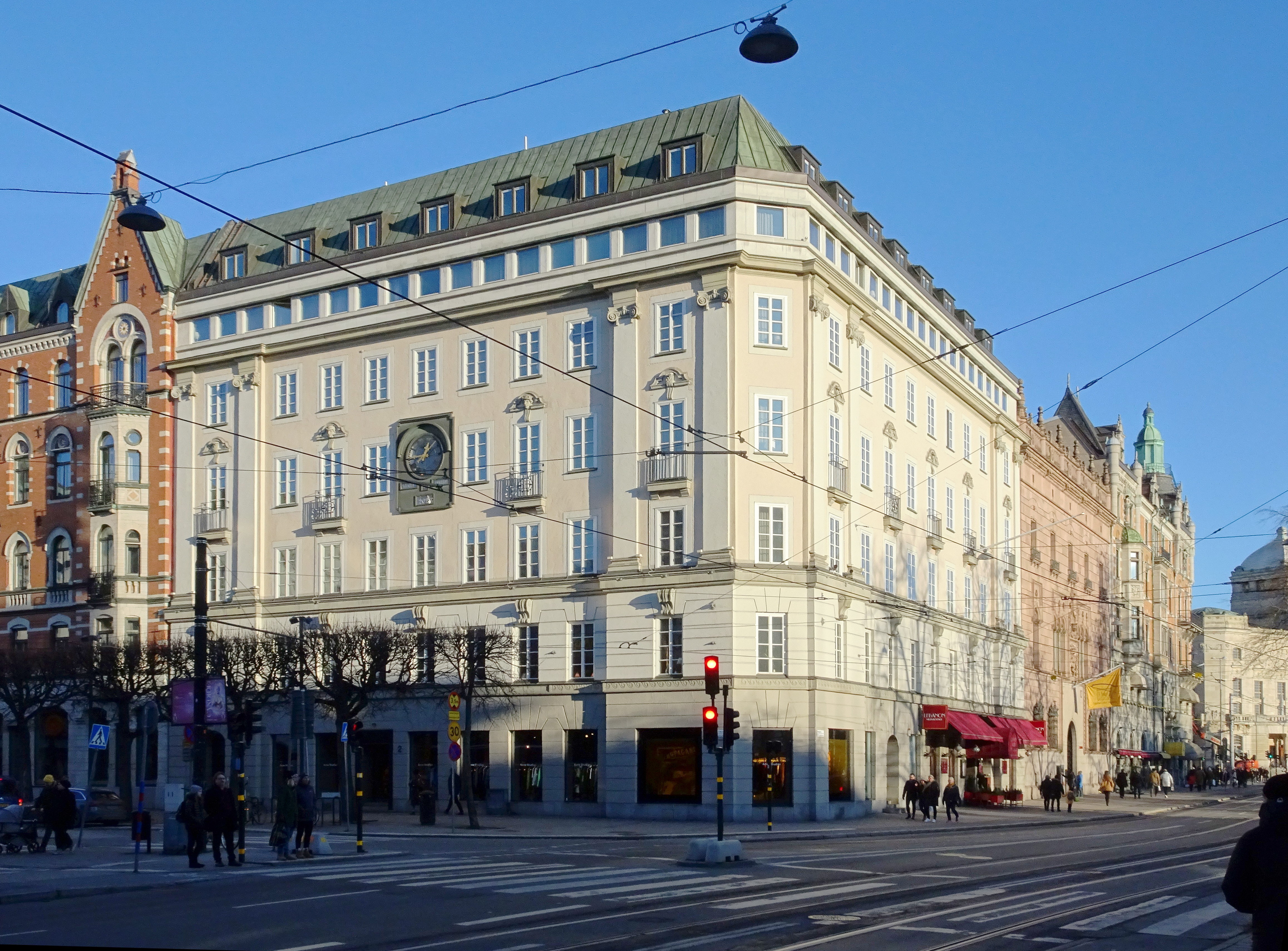 Skravelberget mindre 9 (hus nr 1), hörnet Norrmalmstorg / Hamngatan